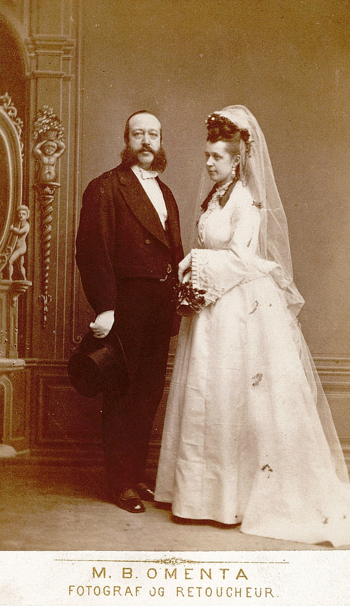 Dobbeltportrett, brudebilde, kvinne, mann, stående helfigur. Påskrift på baksiden: Fru Sara Hall med en venlig hilsen fra originalene. Håber kontravisit.